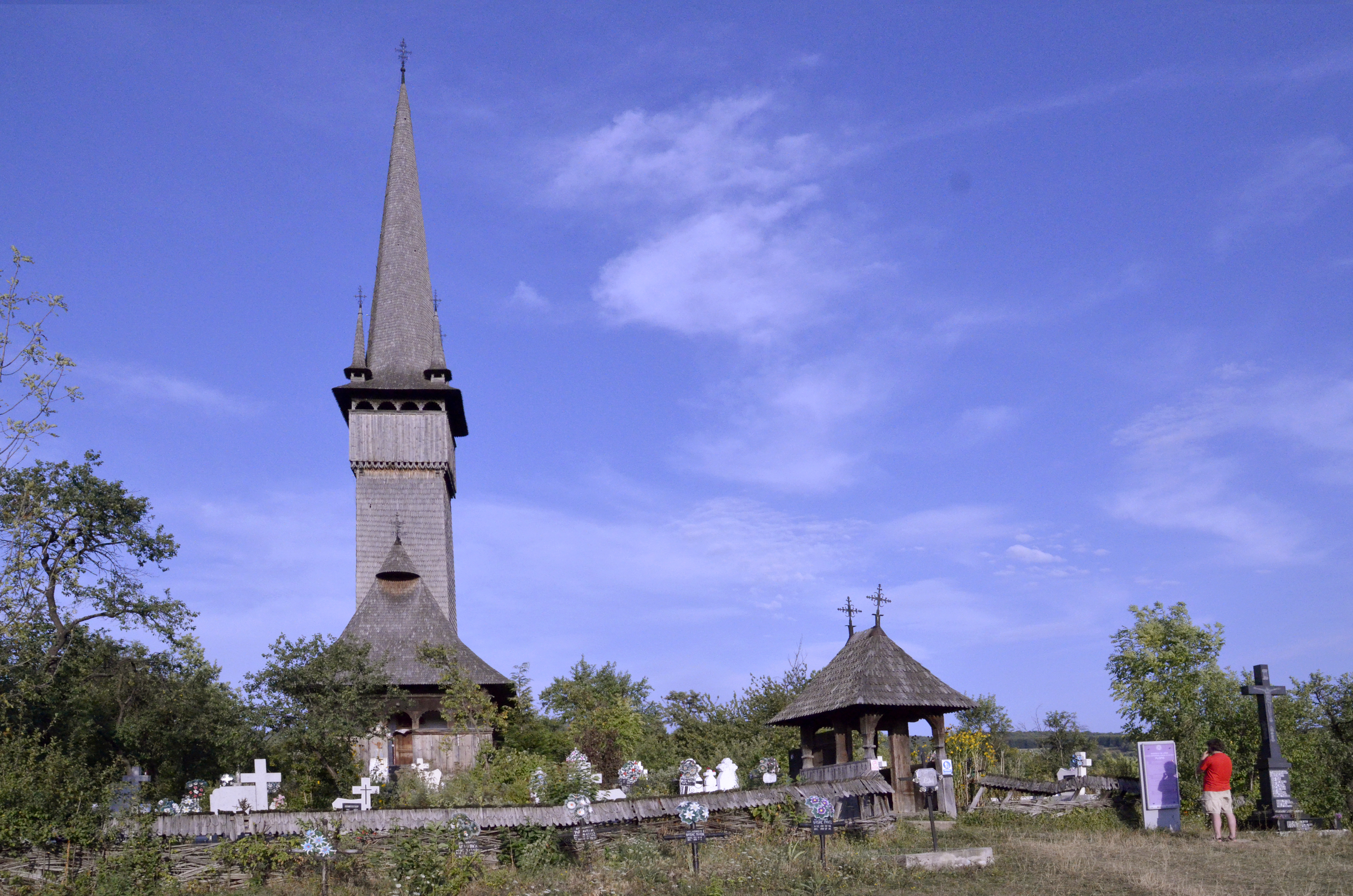 Biserica de lemn „Sf.Arhangheli” de la Plopiș, Maramureș, Romania